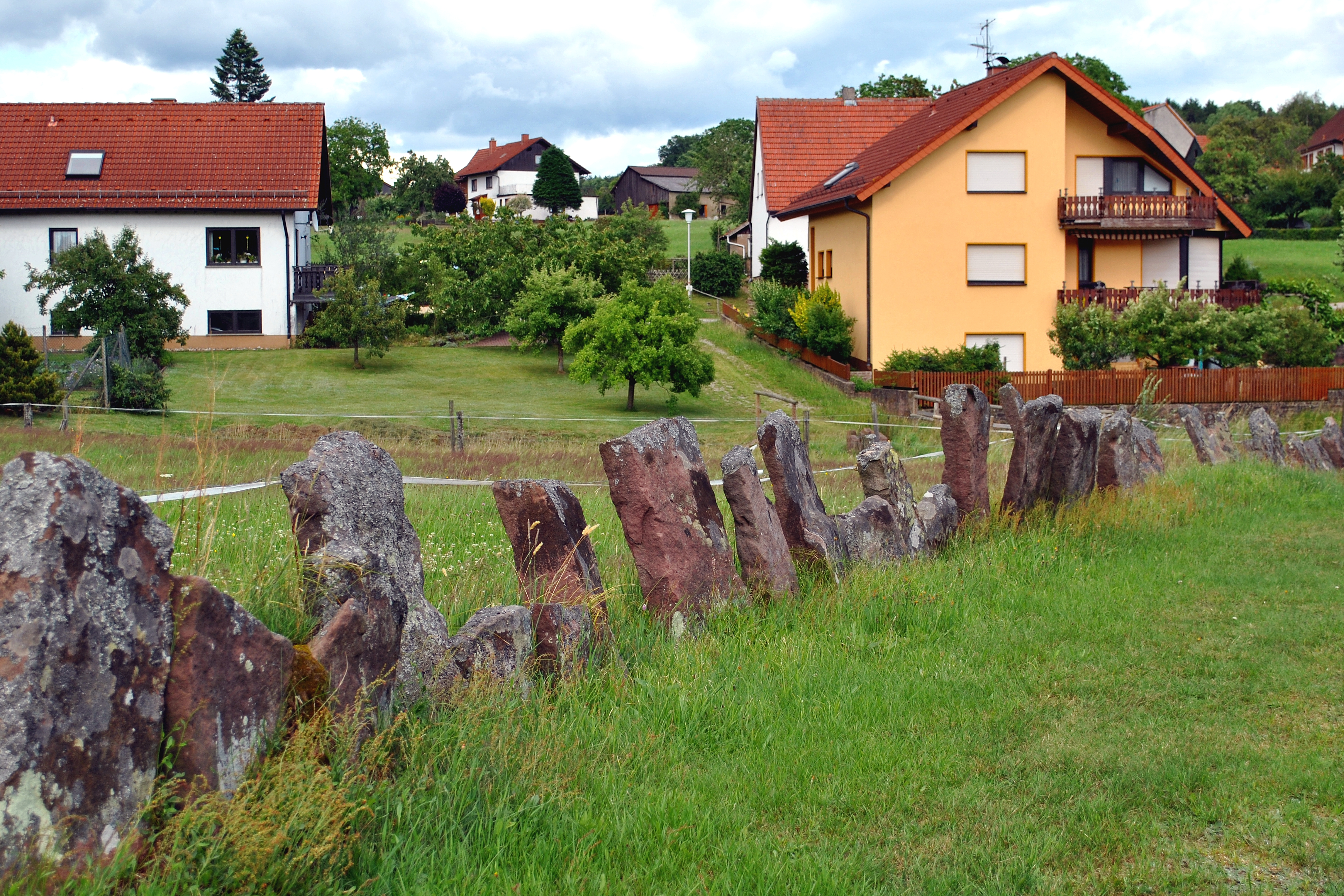 So genannte "Stellsteine", mit denen früher die Hufen gegeneinander abgegrenzt wurden, in Hesselbach